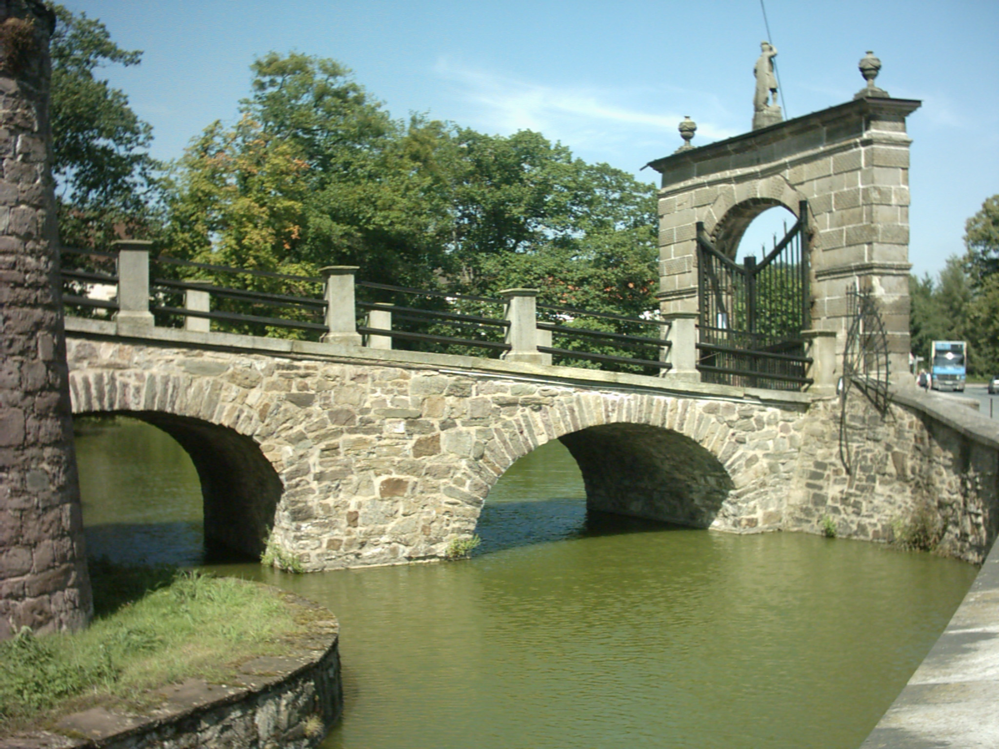 Schlossbrücke Hämelschenburg - selbst fotografiert 8/2005 - GNU-FDL